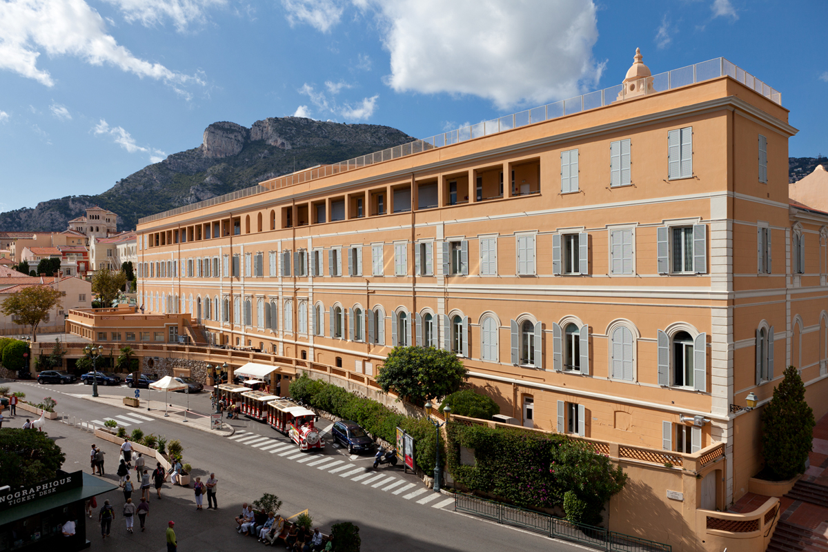 Façade sud du Lycée Albert 1er vue depuis le Musée Océanographique de Monaco.